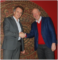 Avtroppende administrerende direktør Gulbrand Wangen (til høyre) sammen med ny administrerende direktør Sjur E. Bratland.